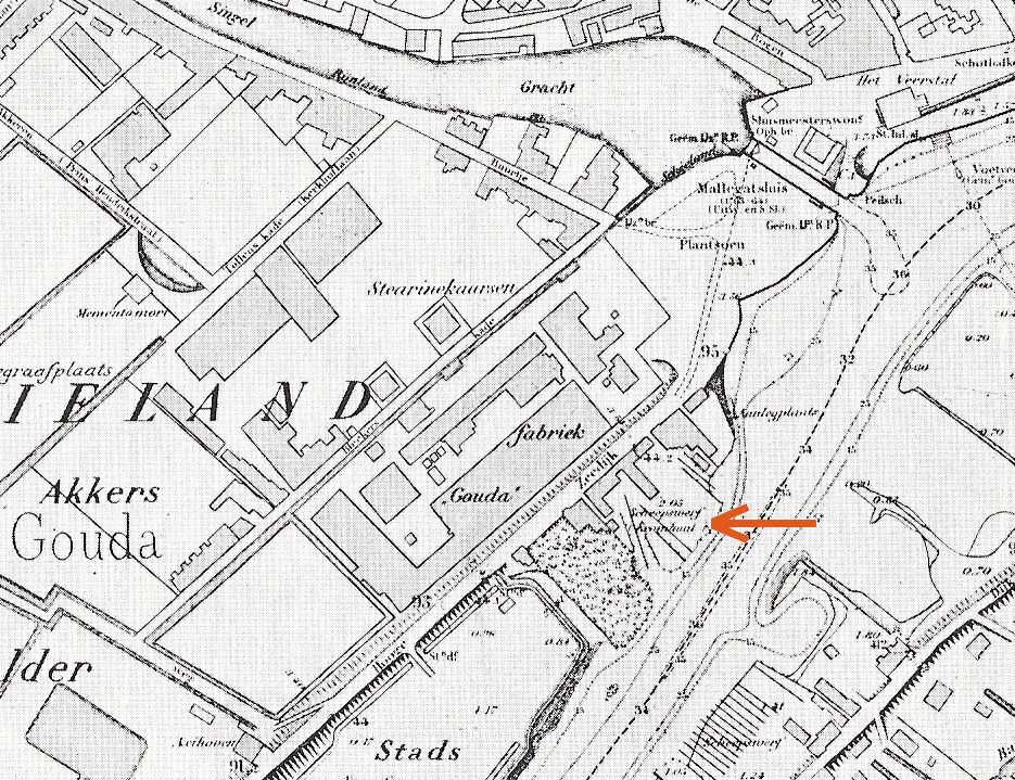 Detail van een stadsplattegrond van Gouda omstreeks 1900 met ingetekend (bij de rode pijl) van het terrein van de toenmalige scheepswerf Het Kromhout met gebouwen en hellingen